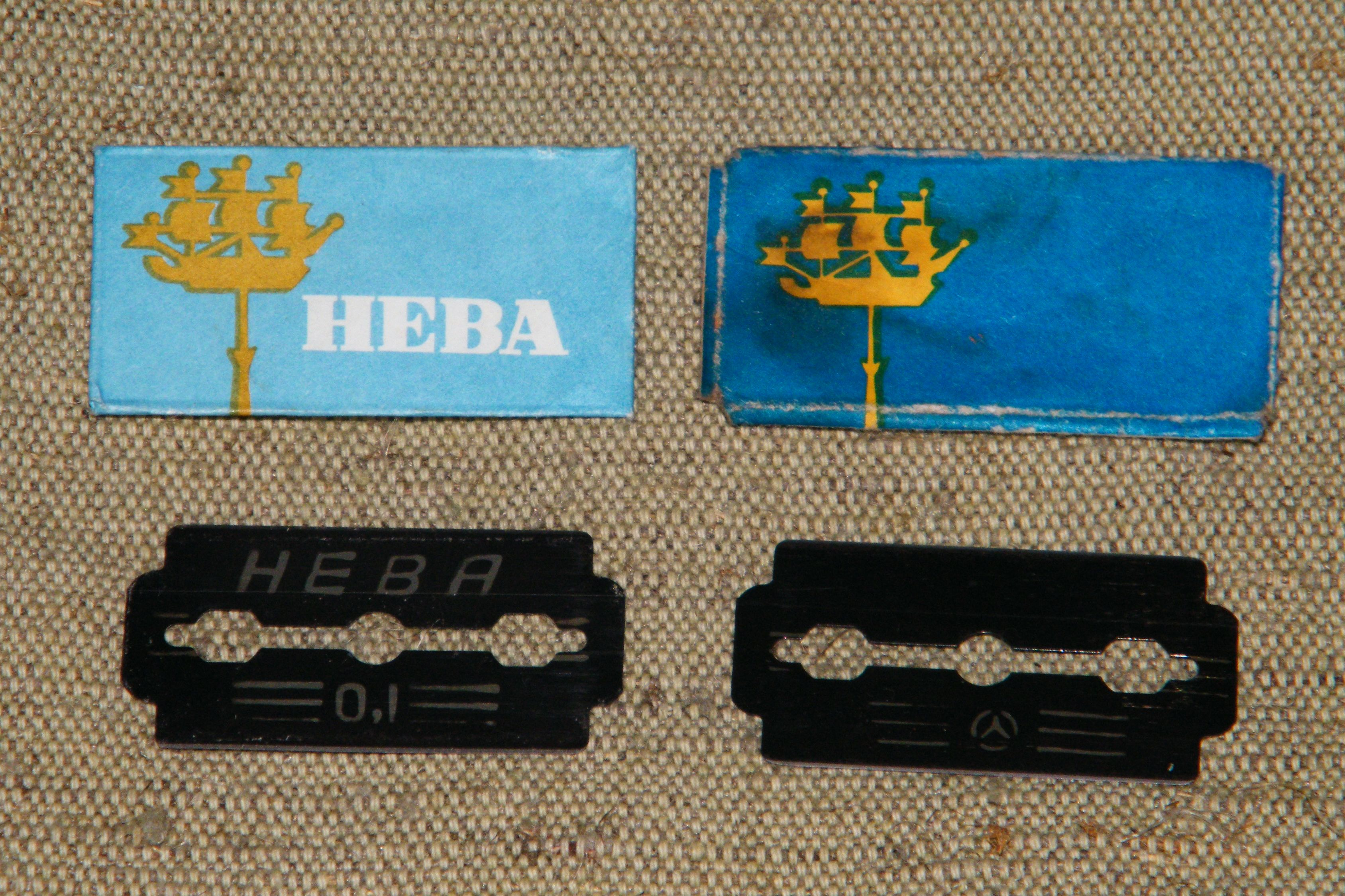 Бритвенные лезвия Нева и Техническое СССР 1980-е годы